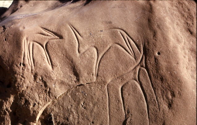 Gravure préhistorique de la région d'El Bayadh, Algérie